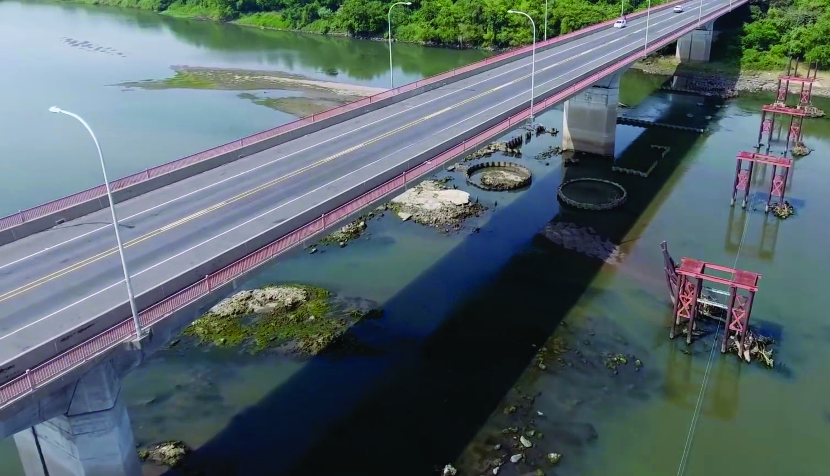 Vista del puente de San Marcos Lempa en la Litoral